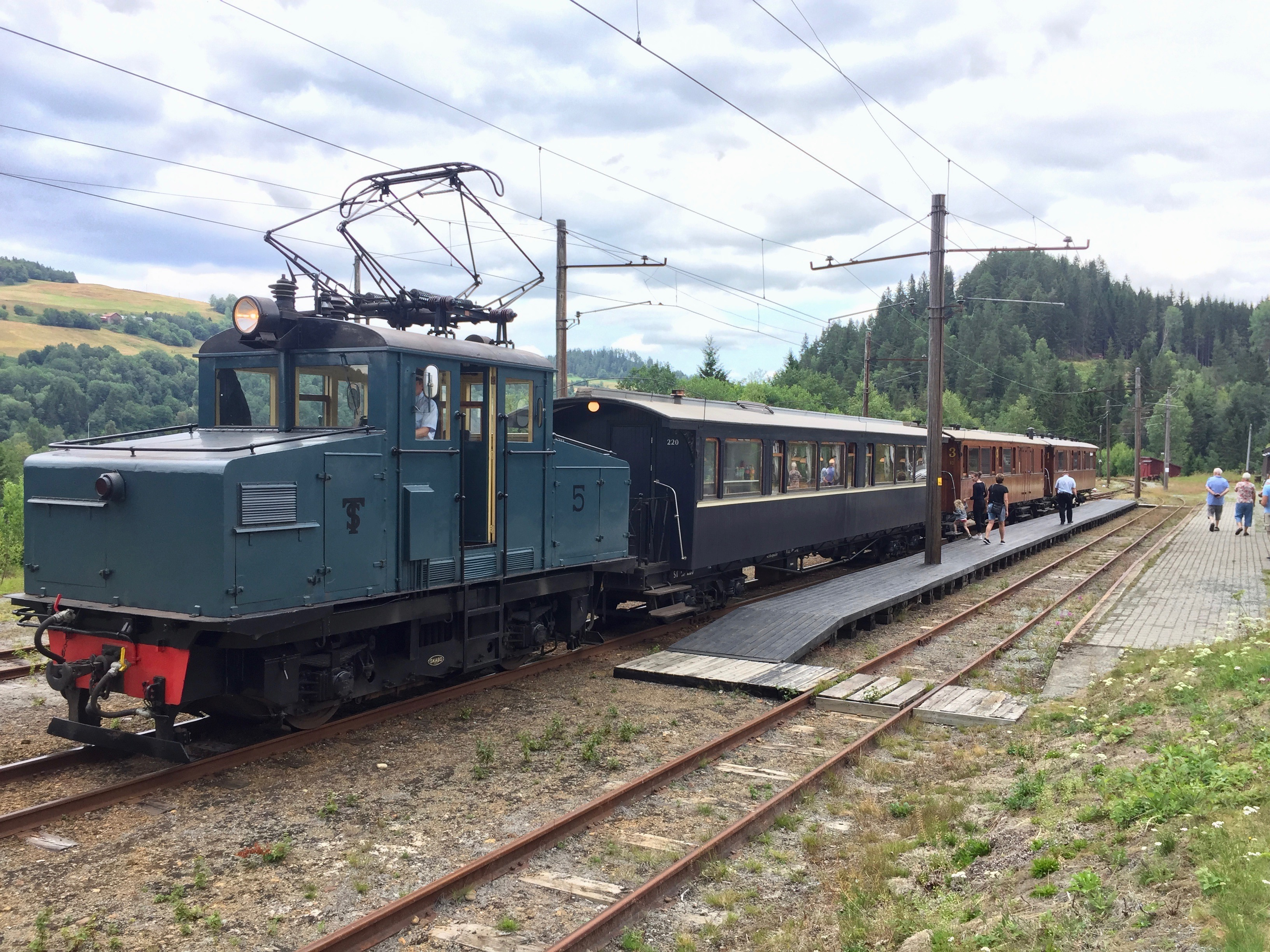 Thamshavnbanen på Svorkmo stasjon.